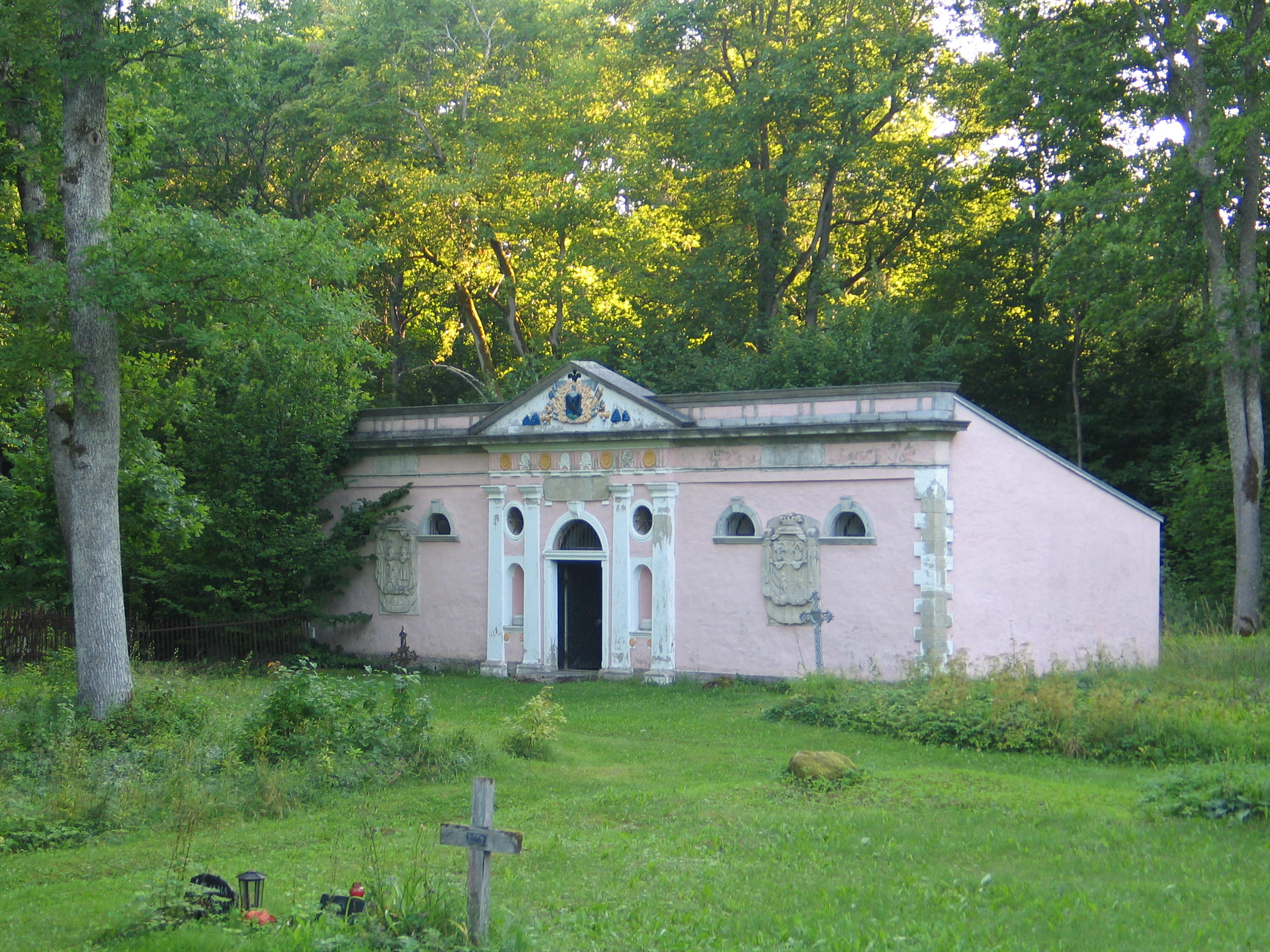 G.W. von Aderkasi kabel Pöide kalmistul